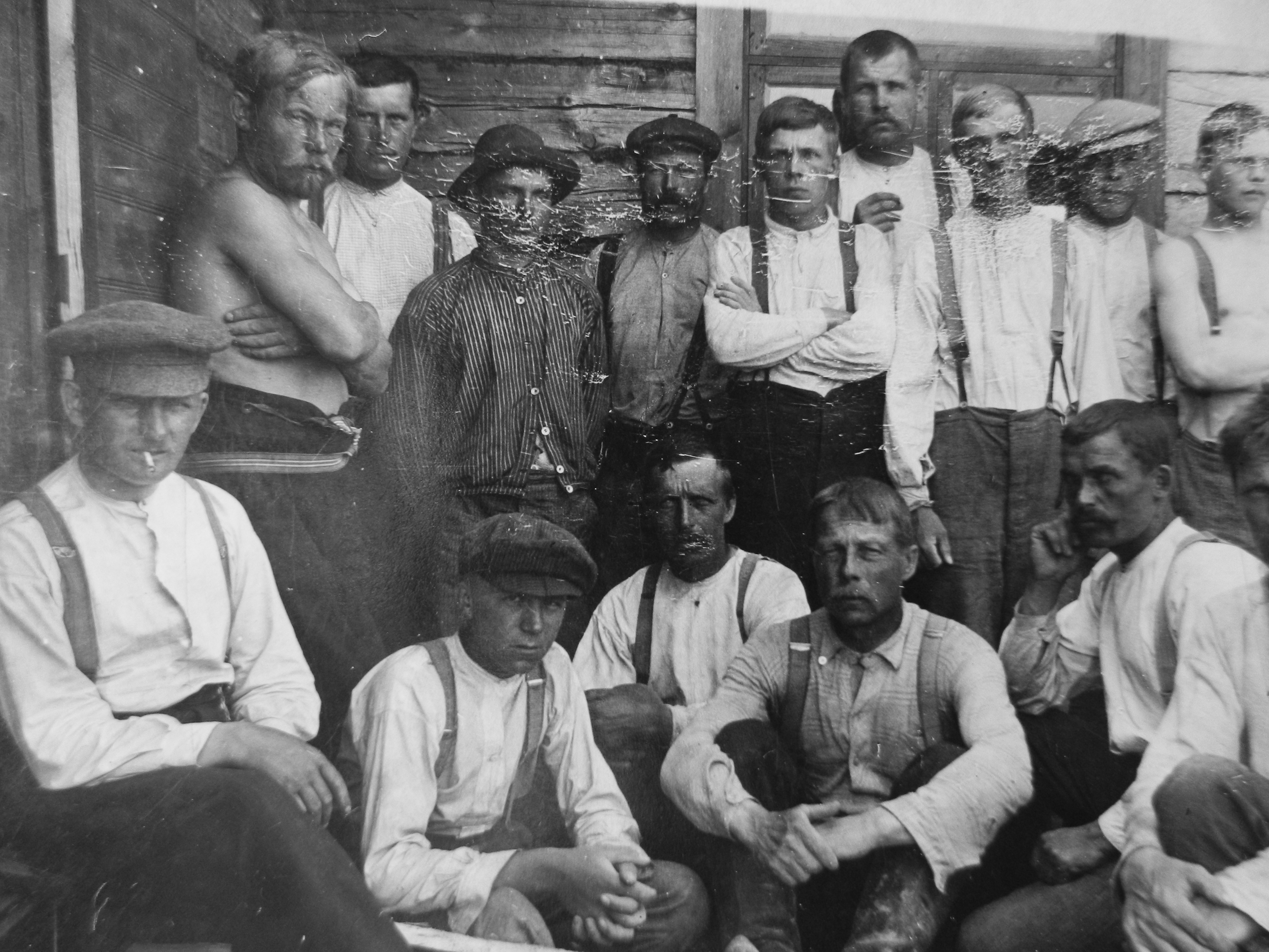 Koponen ja työmiehet, kuvauspaikka ja -aika tuntematon